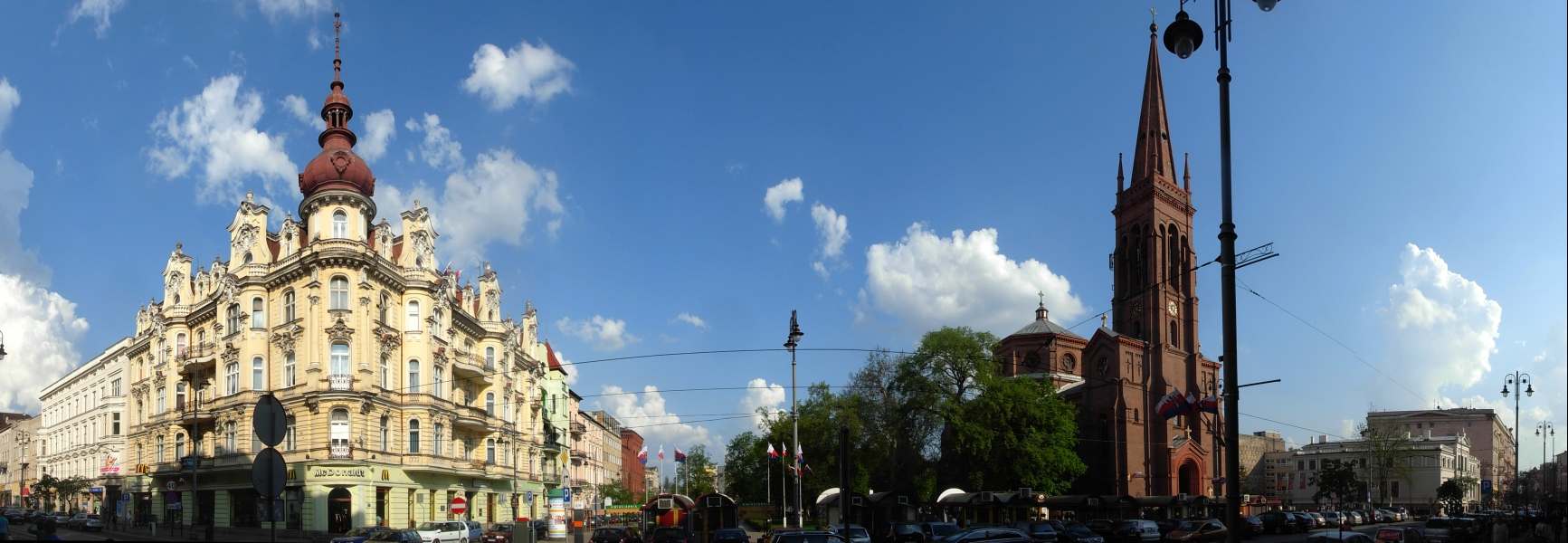 Widok ulicy Gdańskiej w Bydgoszczy w rejonie placu Wolności